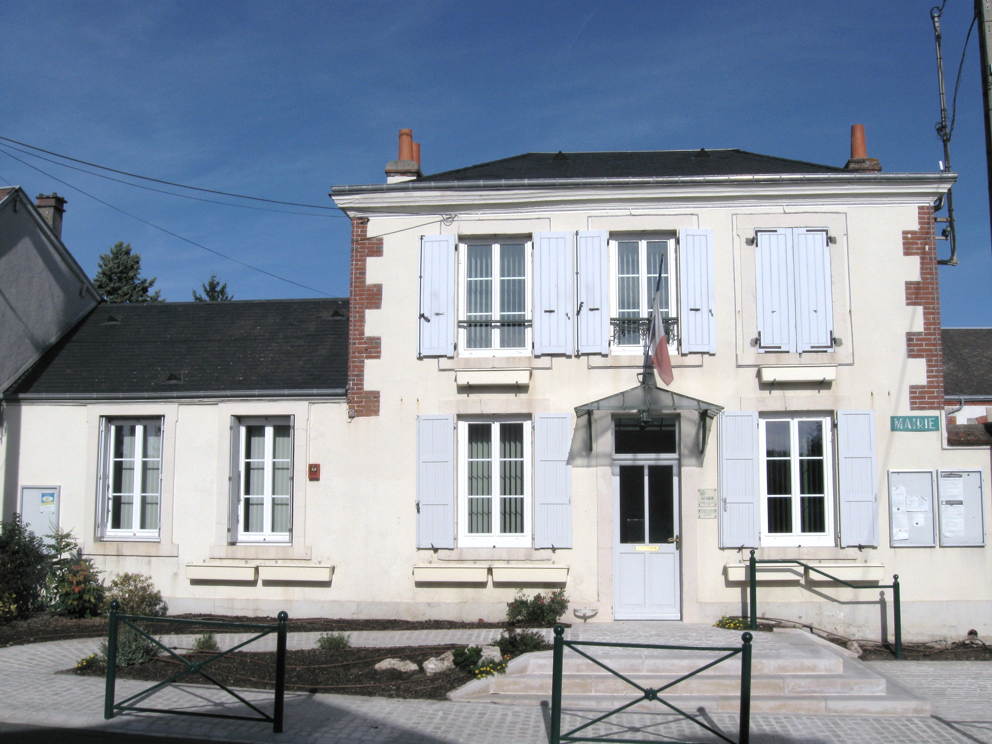 Mairie, Boigny-sur-Bionne, Loiret, France